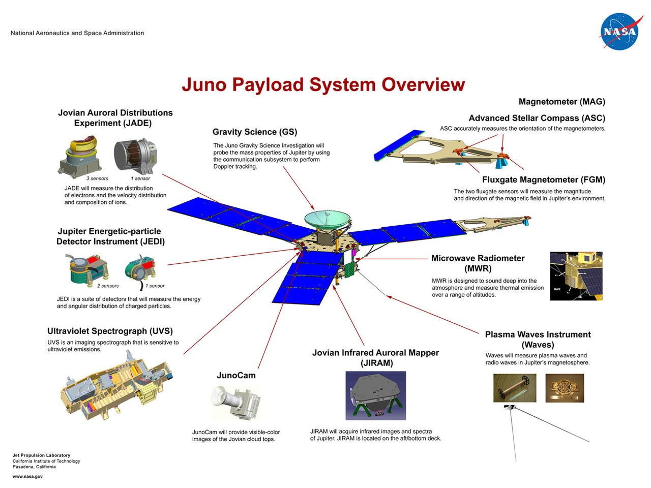 Wo die Instrumente an Juno befestigt werden. Die äußeren Felder der Solarpaddeln sind vergrößert worden.